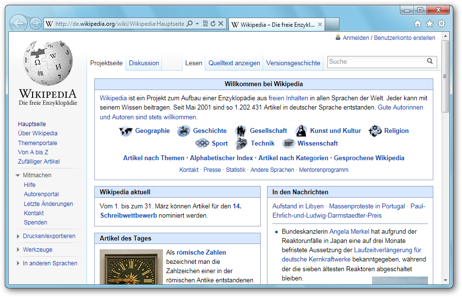 Bildschirmfoto des Internet Explorer 9 unter Microsoft Windows 7